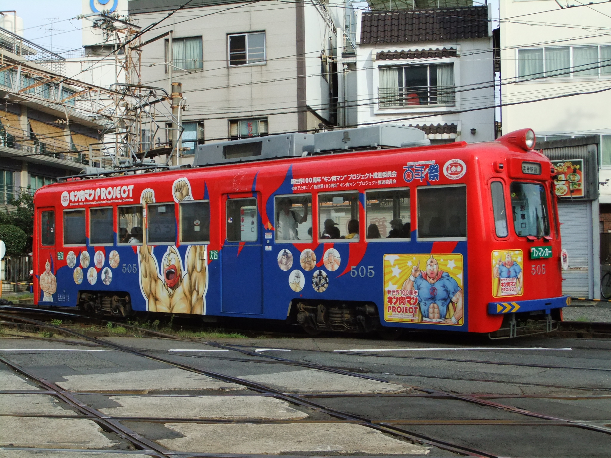 阪堺電気軌道 モ505 キン肉マン塗装